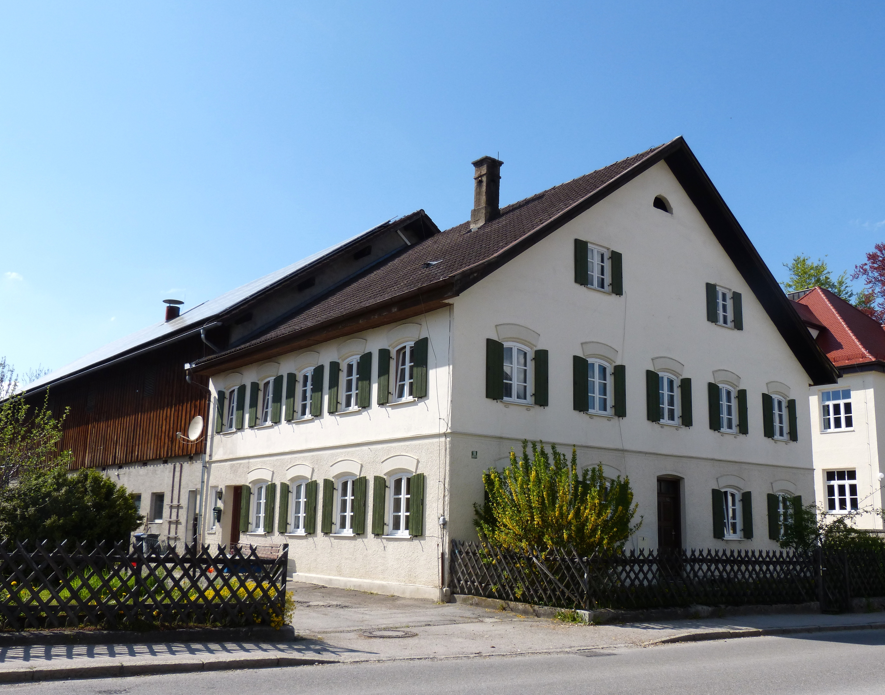 Andechs, OT Erling, Andechser Straße 11. Das Wohnstallhaus, ein zweigeschossiger Einfirstbau mit mittelsteilem Dach, Segmentbogenfenstern und Putzgliederungen, trägt an der geschnitzten Haustür die Bezeichnung 1845.